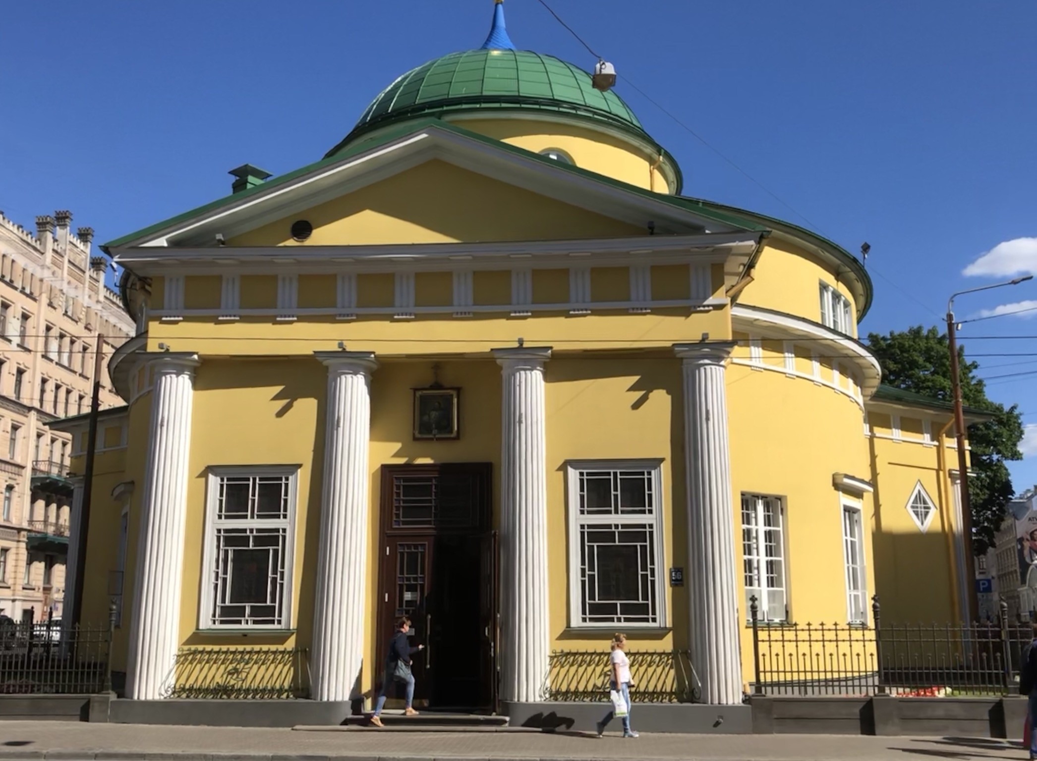 Alexander Nevsky Kirche in Riga